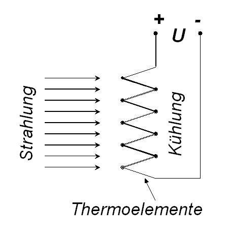 Prinzipskizze Thermosäule zur Strahlungsmessung